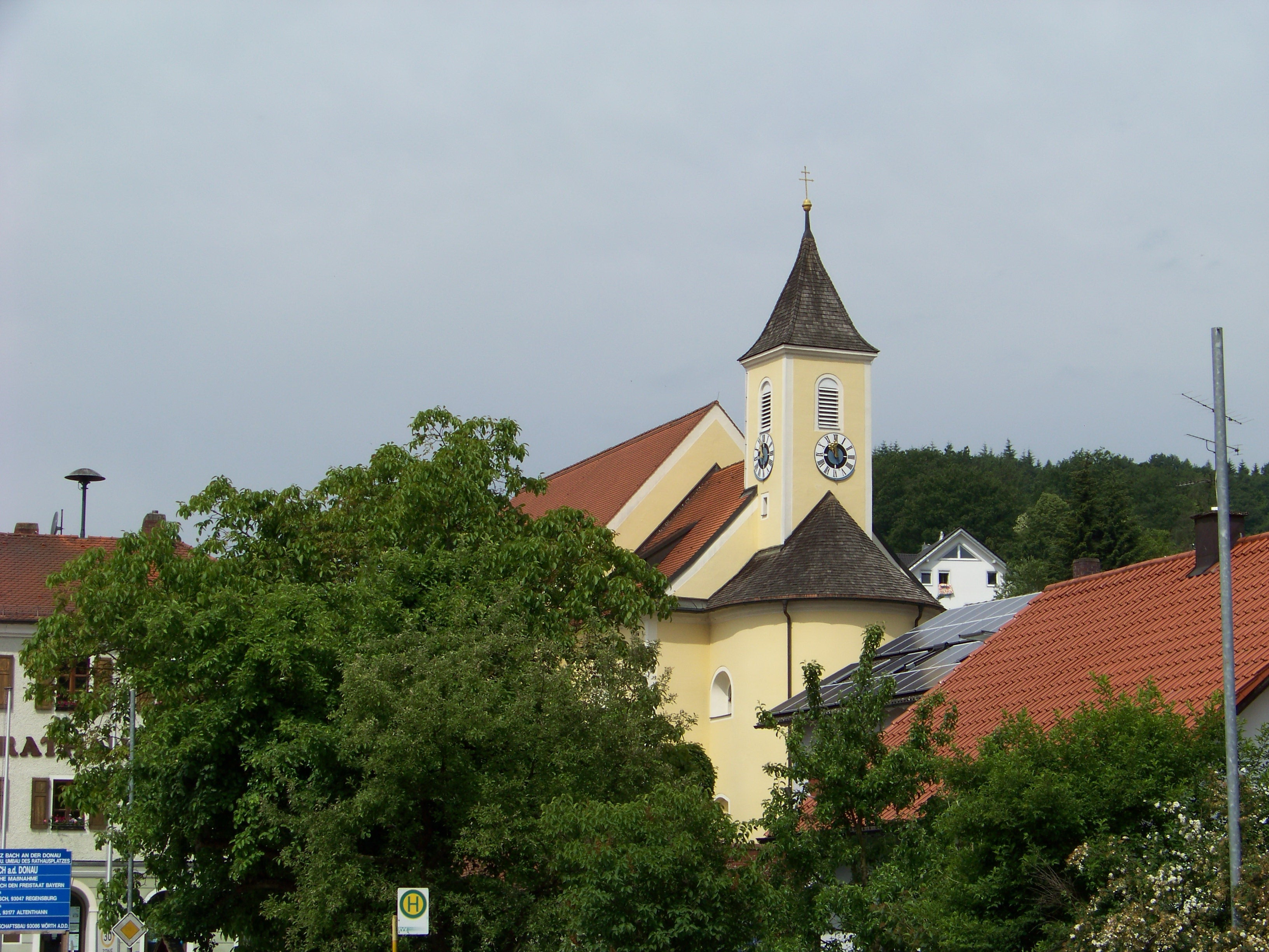 Bach an der Donau. Langhaus und Chor der katholische Pfarrkirche Mariä Geburt, Saalbau mit eingezogenem Chor und Chorturm, 1712 (Langhaus 1979); mit Ausstattung.